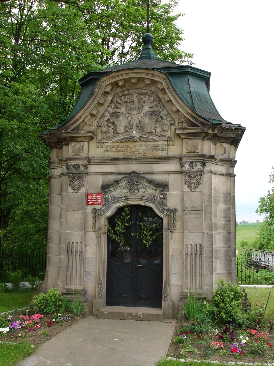 Niederaltwilmsdorf: Hussitenkapelle zum Gedenken an Herzog Johann von Münsterberg